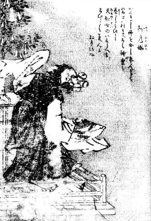 Suzuhiko-hime (鈴彦姫) from the Gazu Hyakki Tsurezure Bukuro (百器徒然袋)